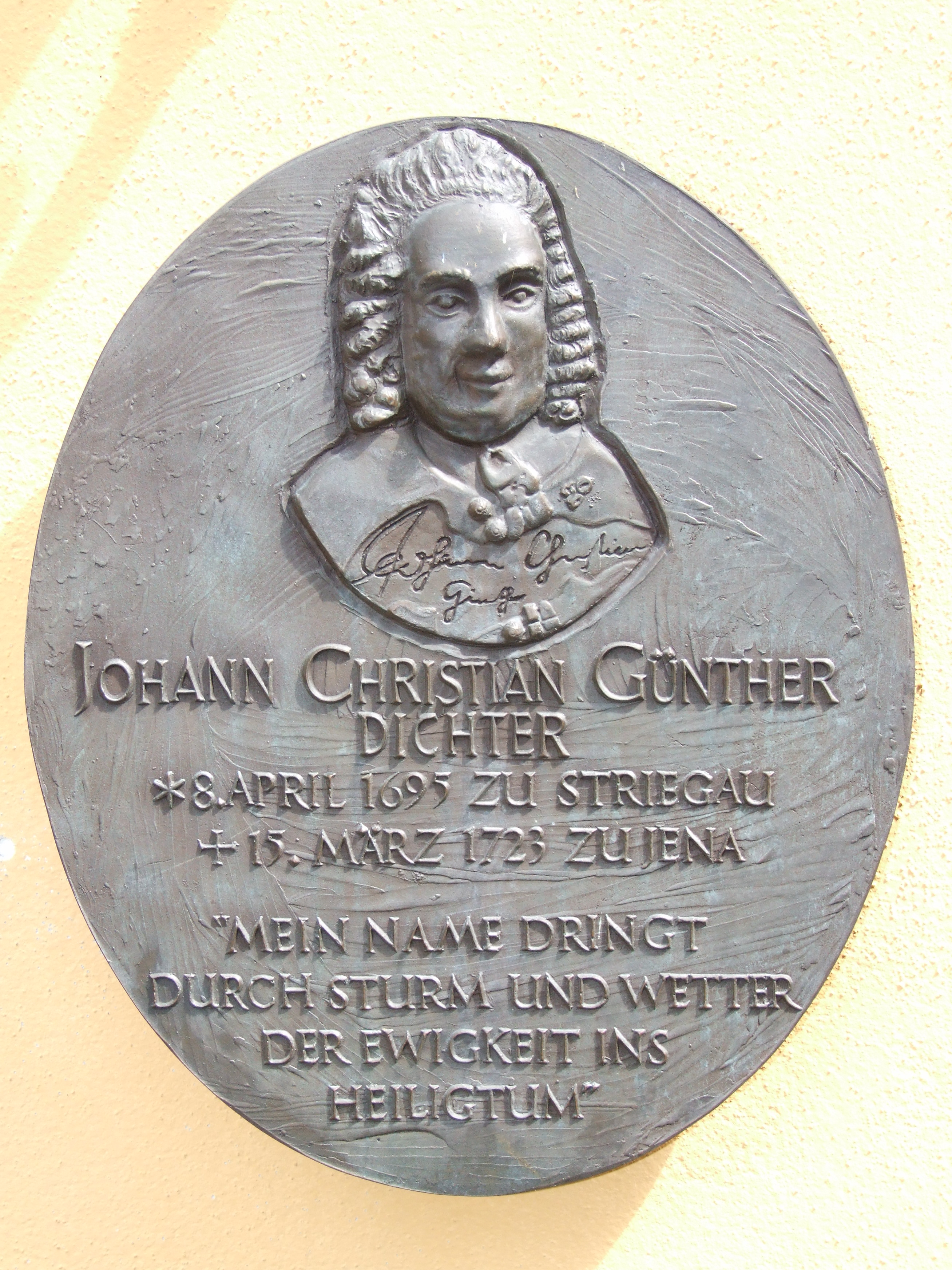 Relief Johann Christian Günther an der Mauer von Haus Schlesien, Königswinter